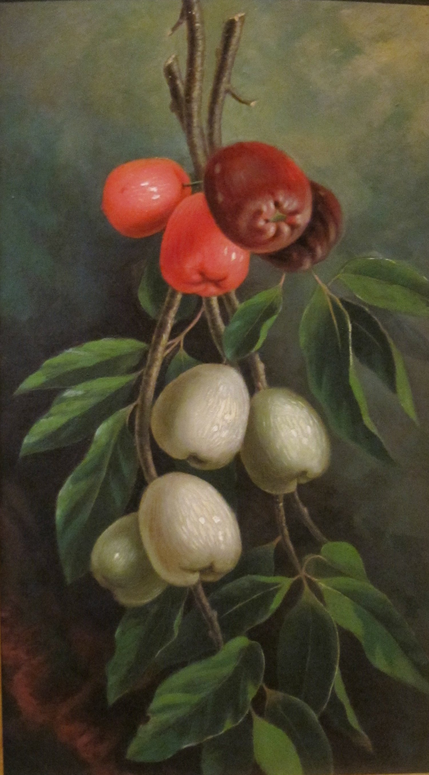 Ōhi'a 'ai